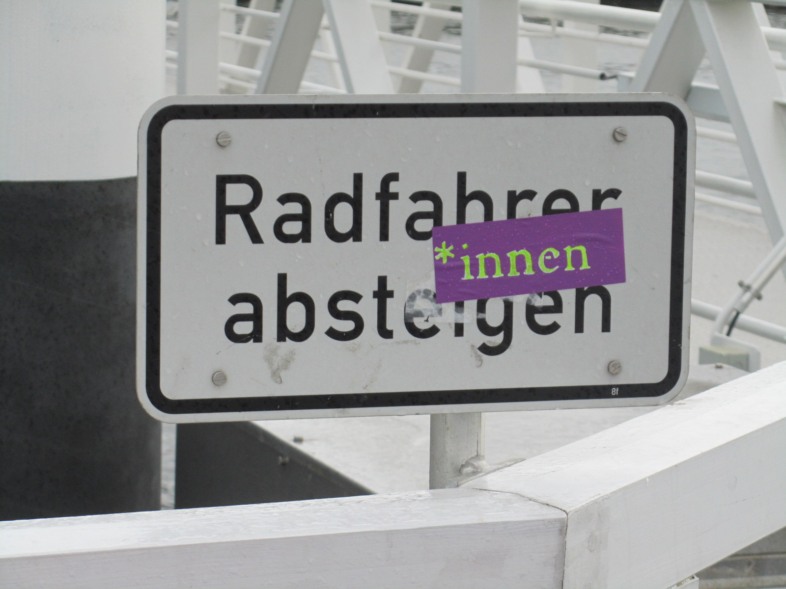 Radfahrer*innen absteigen: Aufkleber an einem Hinweisschild in Kiel (Hörnbrücke)